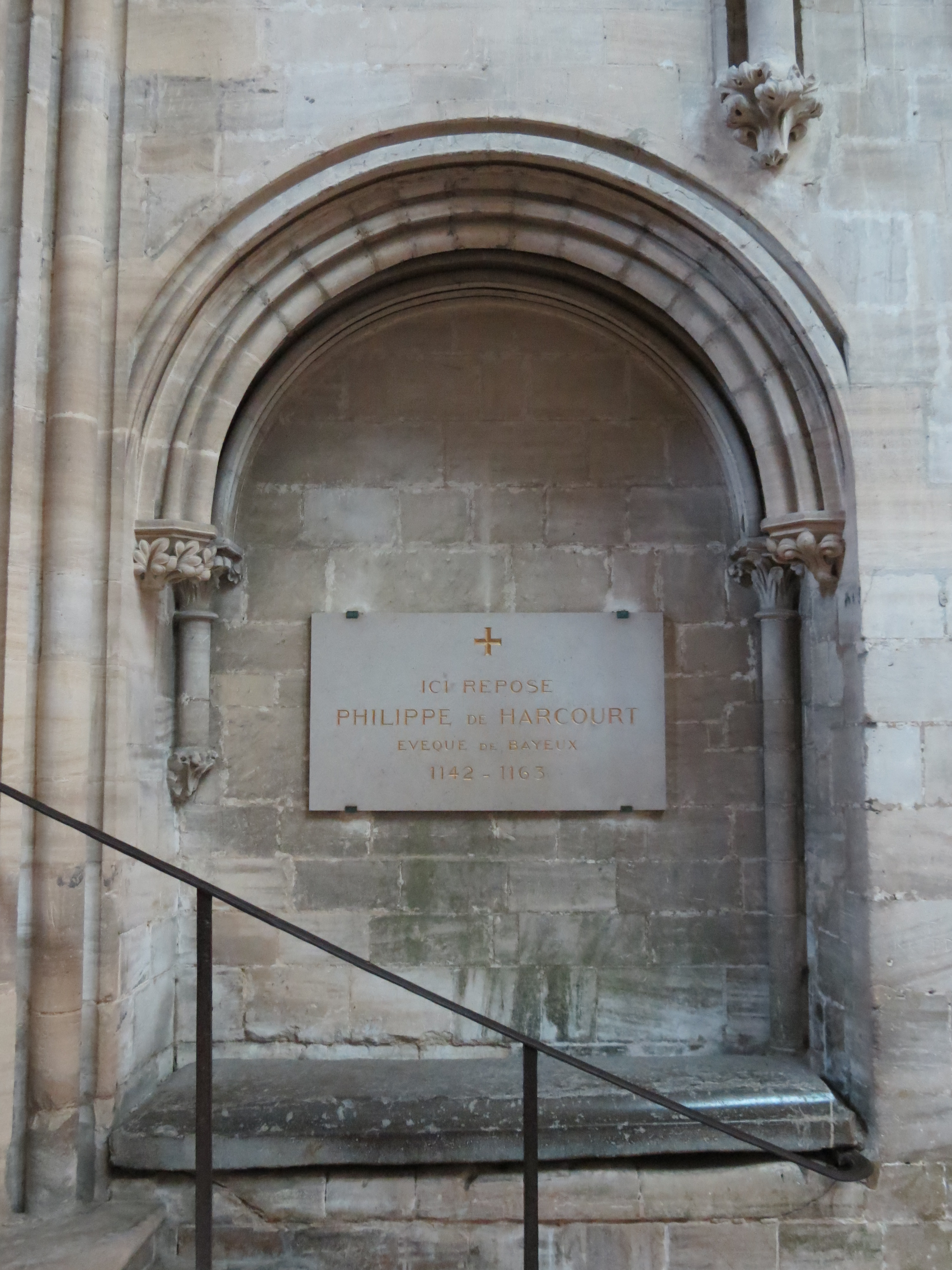 Enfeu avec la dalle funéraire de Philippe d'Harcourt († 1163), évêque de Bayeux (1142-1163)